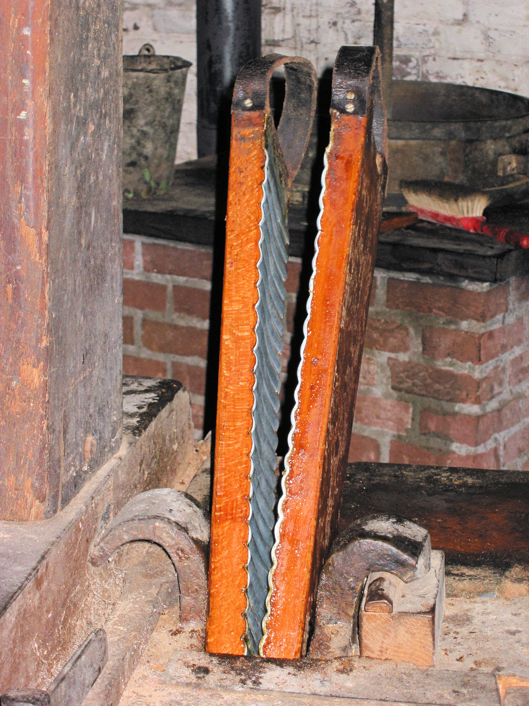 Holten's Molen haar in jaagijzers, Deurne, the Netherlands